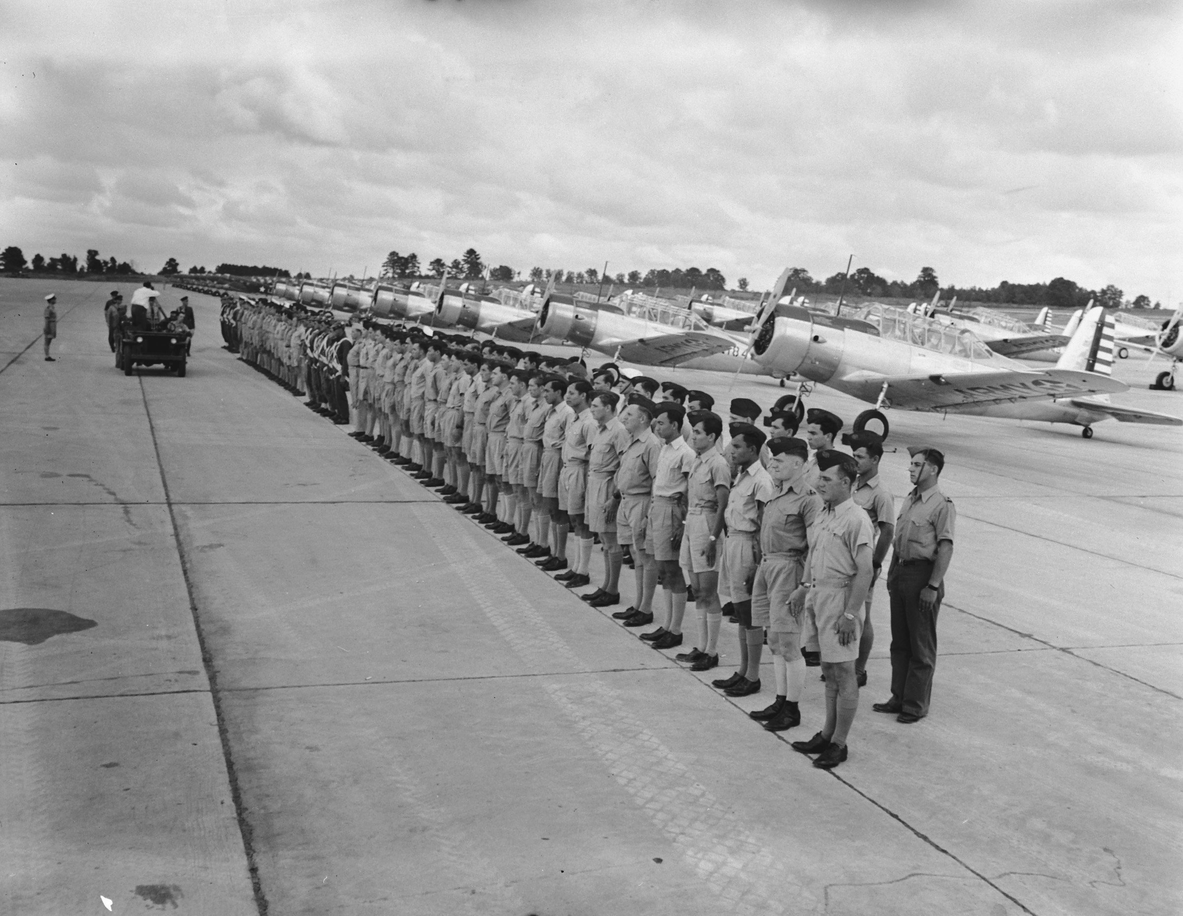 Collectie / Archief : Fotocollectie Anefo Reportage / Serie : [ onbekend ] Beschrijving : Piloten van de ML-KNIL, onder commando van generaal-majoor L.H. van Oyen, die zijn ontsnapt uit Nederlands-Indië krijgen een opleiding in Fort Jackson, Mississippi. Nederlandse en Indonesische vliegers staan opgesteld voor inspectie door generaal Van Oyen Annotatie : Achter hen opgesteld de trainingsvliegtuigen van het type Vultee BT-13 Valiant Datum : 1942 Locatie : Mississippi Trefwoorden : piloten, trainingskampen, tweede wereldoorlog Fotograaf : [onbekend] Auteursrechthebbende : Nationaal Archief Materiaalsoort : Negatief (zwart/wit) Nummer archiefinventaris : bekijk toegang 2.24.01.04 Bestanddeelnummer : 934-7760